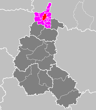 Maps of arrondissements and cantons of France: Arrondissement de Charleville-Mézières - Canton de Renwez.PNG